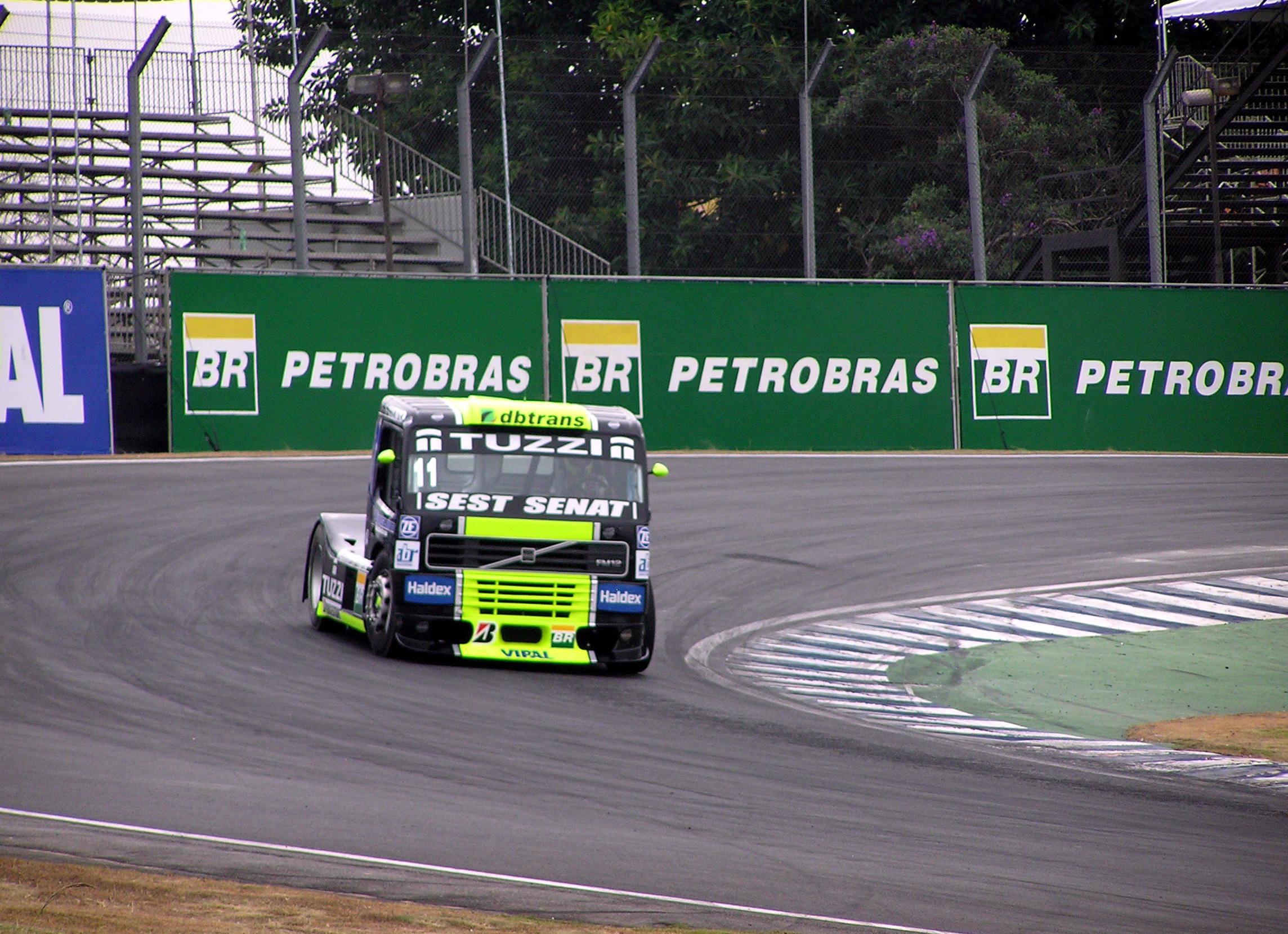 Fórmula Truck 2006 Rd.3 Interlagos: #11 Diumar Bueno, Volvo FM12